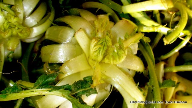 نباتات برية سورية تؤكل